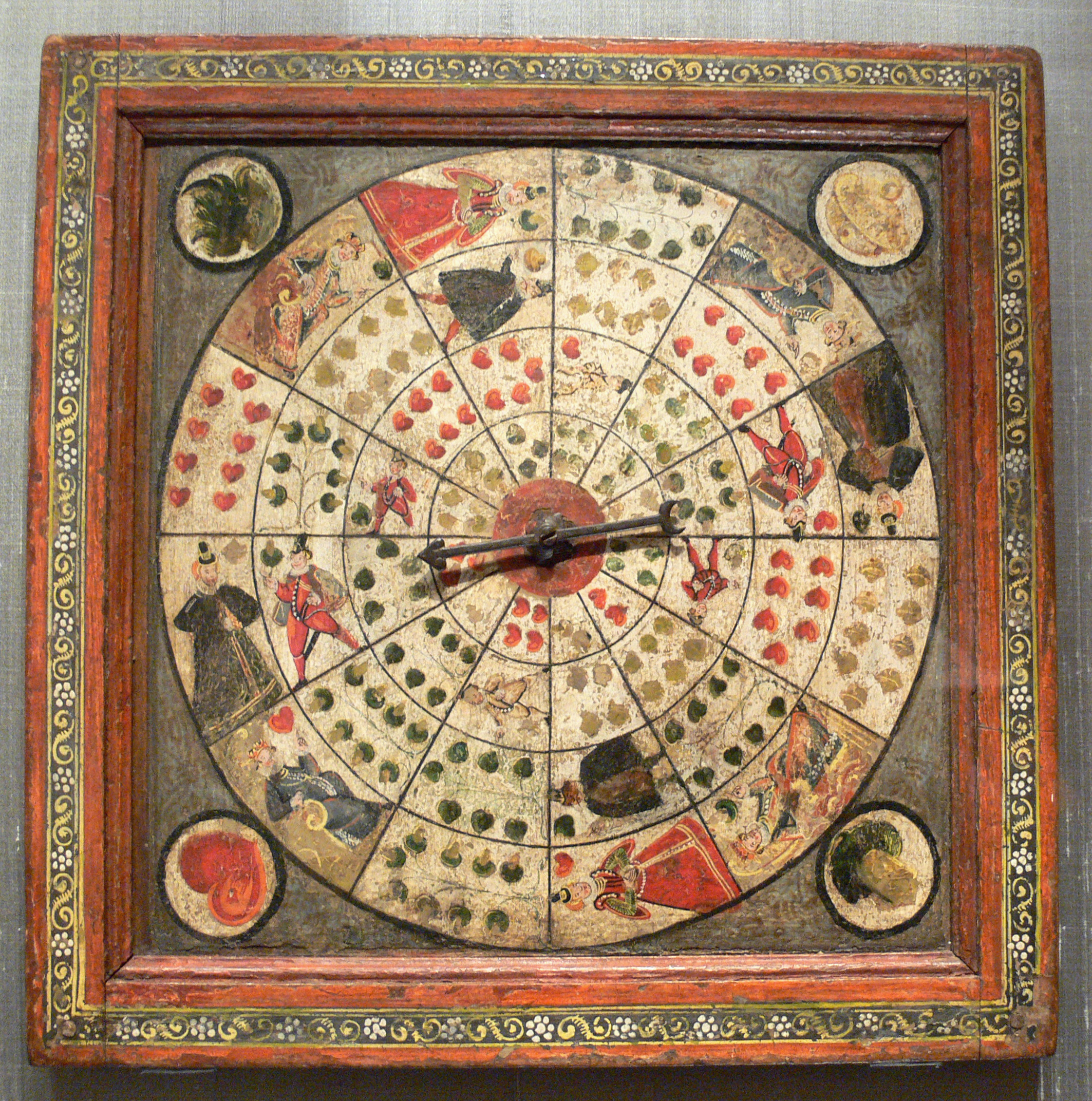 Brett für ein Zeiger-Roulette, oberdeutsch, um 1580 Buchenholz, bemalt mit Wismuth und Tempera Bayerisches Nationalmuseum, München, Inv. Nr. I 14 104